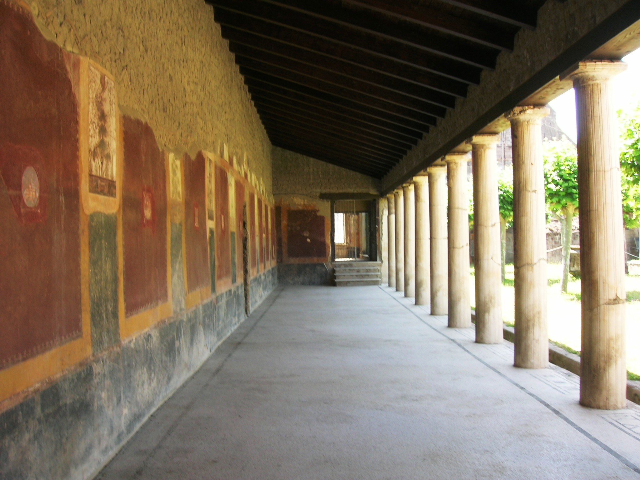 Villa San Marco, villa d'otium di Stabiae, a Castellammare di Stabia